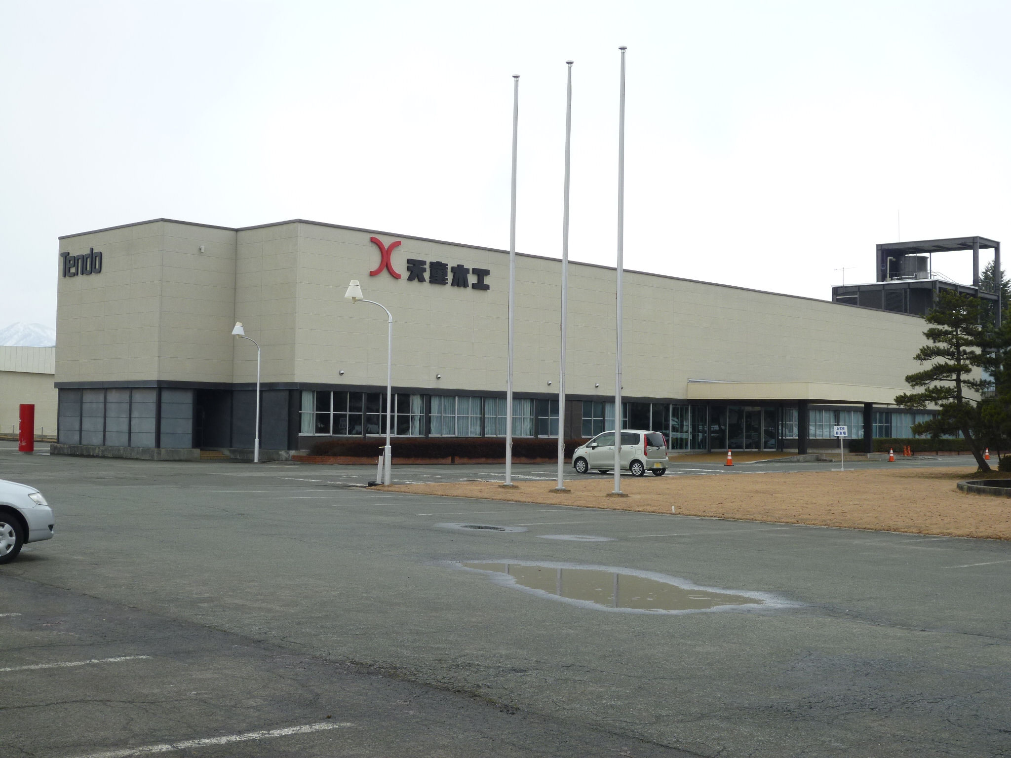 株式会社天童木工本社。天童市乱川に所在。